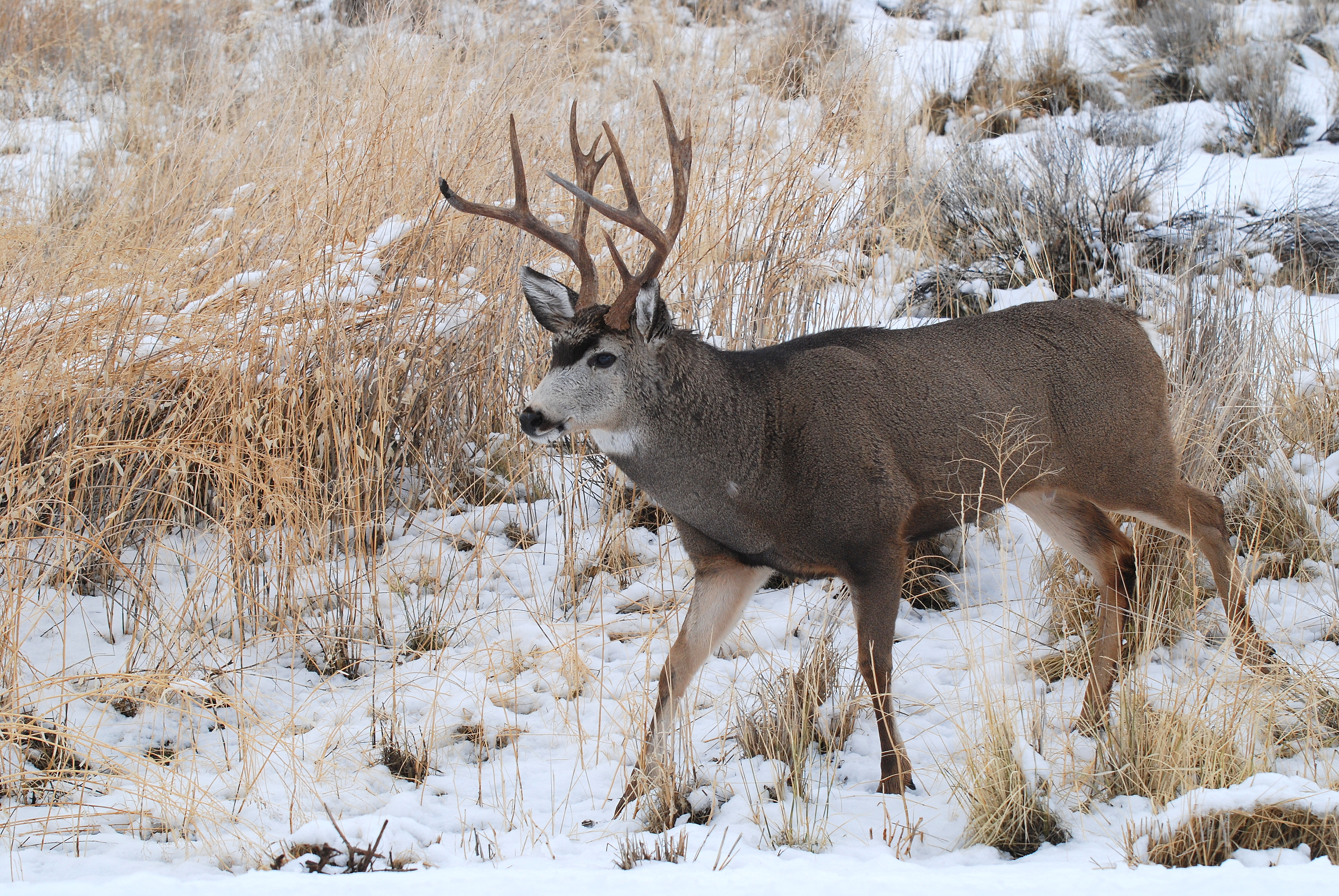 Mule Deer